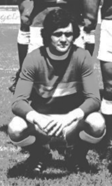 Title: Mannschaftsfoto BSG Chemie Böhlen Factual corrections and alternative descriptions are encouraged separately from the original description. Additionally errors can be reported at this page to inform the Bundesarchiv. Original historic description: ADN-ZB-Kluge-10.8.82-zin-Bez. Leipzig: BSG Chemie Böhlen - Aufsteiger zur Fußball-Oberliga für die Spielserie 1982-83. Durch den ersten Rang in der Aufstiegsrunde gelang der BSG Chemie Böhlen in diesem Jahr wieder der Sprung in die höchste Spielklasse der DDR. Hintere Reihe v.l.n.r.: Mannschaftskapitän Klaus Havenstein, Roland Hammer, Rainer Srodecky, Horst Kunze, Lothar Höhne und Rolf Tröger. Mittlere Reihe v.l.n.r.: Bernd Hubert, Manfred Zaspel, Torhüter Freimuth bott, Torhüter Klaus Herber, Bodo Gladrow und Rainer Wolf. Vordere Reihe v.l.n.r.: Gunter Amler, Olaf Adamczak, Friedhelm Schneider und Klaus Bittner. Es fehlen Detlev Müller und Christian Kalainski.